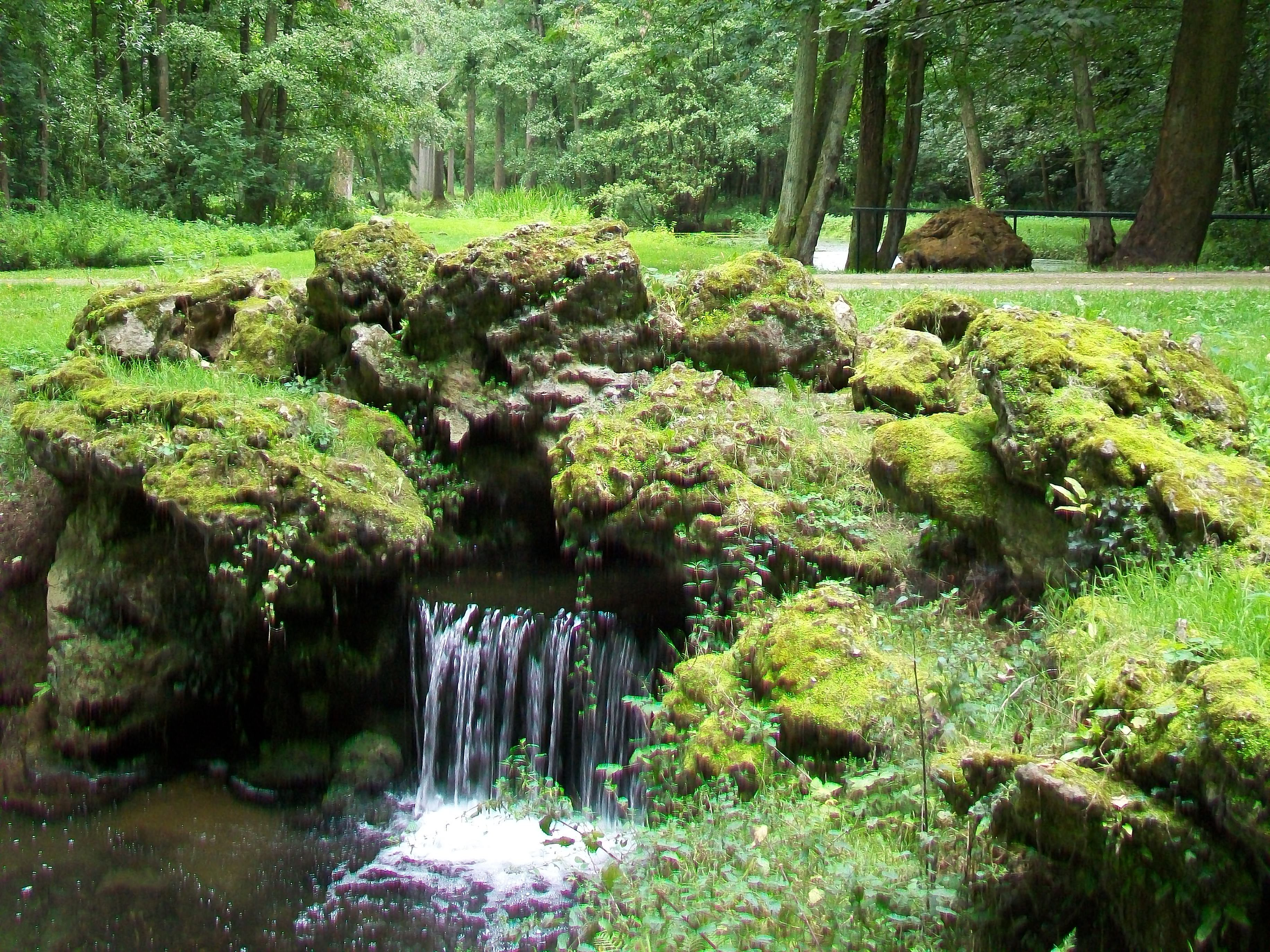 La cascade à l'ouest du parc de Geresme.